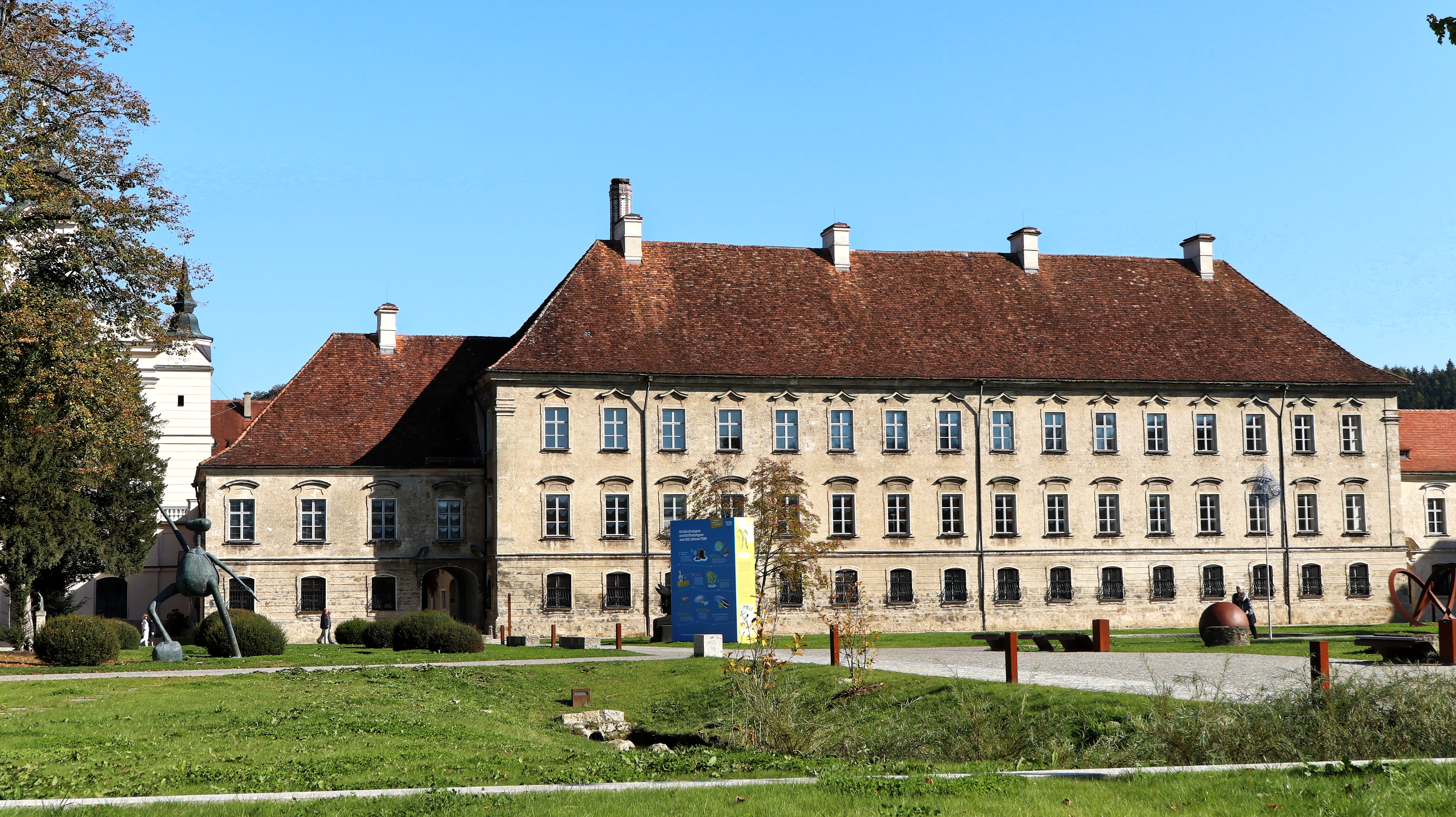 Aussenansichten von Kloster Raitenhaslach, Die Klosterkirche Raitenhaslach und der 1762 fertiggestellte Prälatenstock, heute Sitz des Akademiezentrums der TUM.